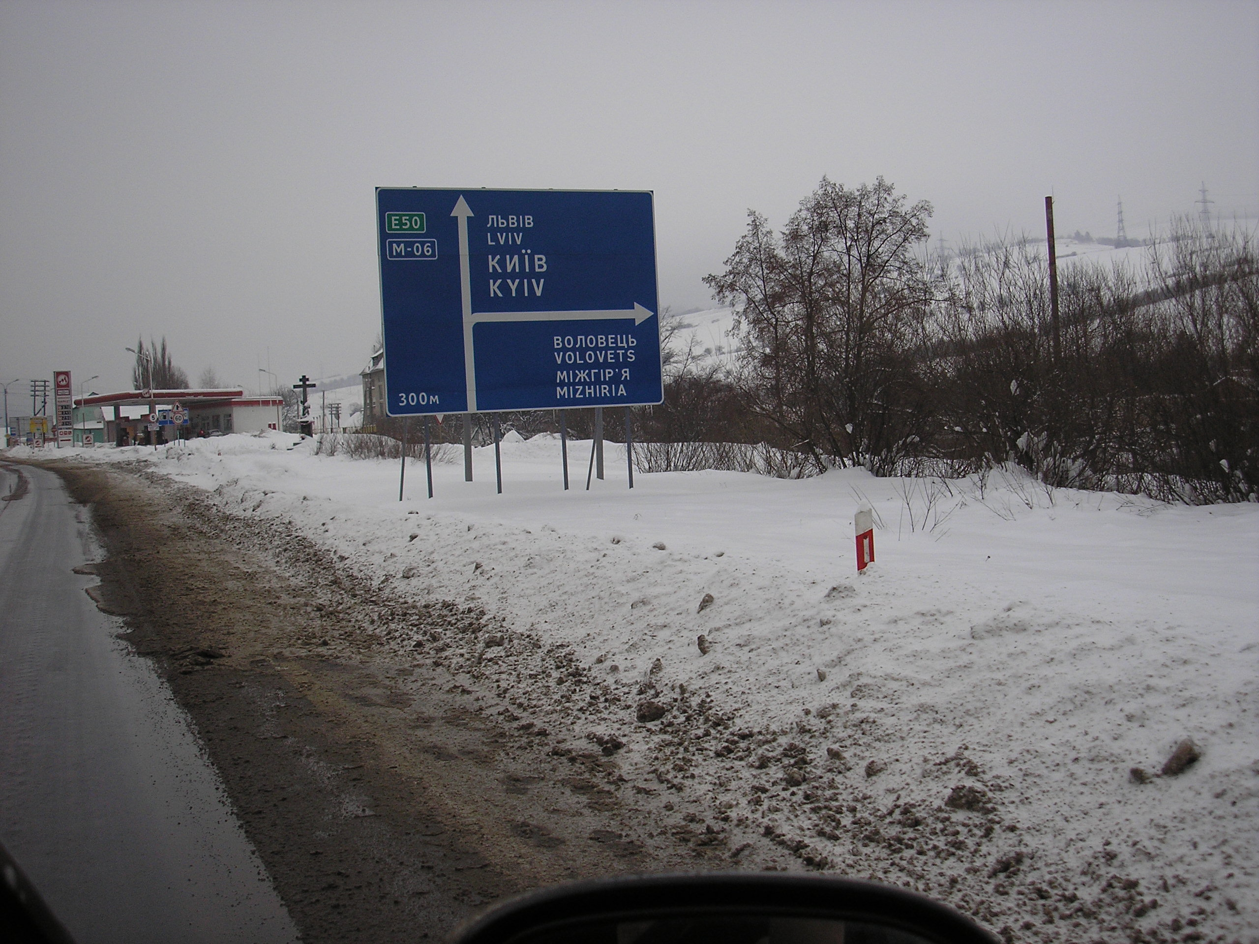 Strassenschild auf der M06